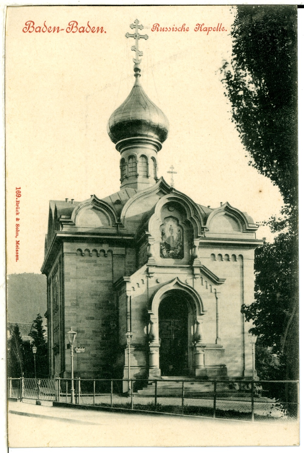 Baden-Baden; Russische Kapelle Diese Ansichtskarte stammt vom Kunstverlag Brück & Sohn aus Meißen ( Die Karte hat die eindeutige Nummer 00169 und ist in höherer Auflösung beim Verlag erhältlich. Sie wurde im Rahmen einer Kooperation zwischen Wikipedianern und dem Kunstverlag für Wikimedia Commons zur Verfügung gestellt.